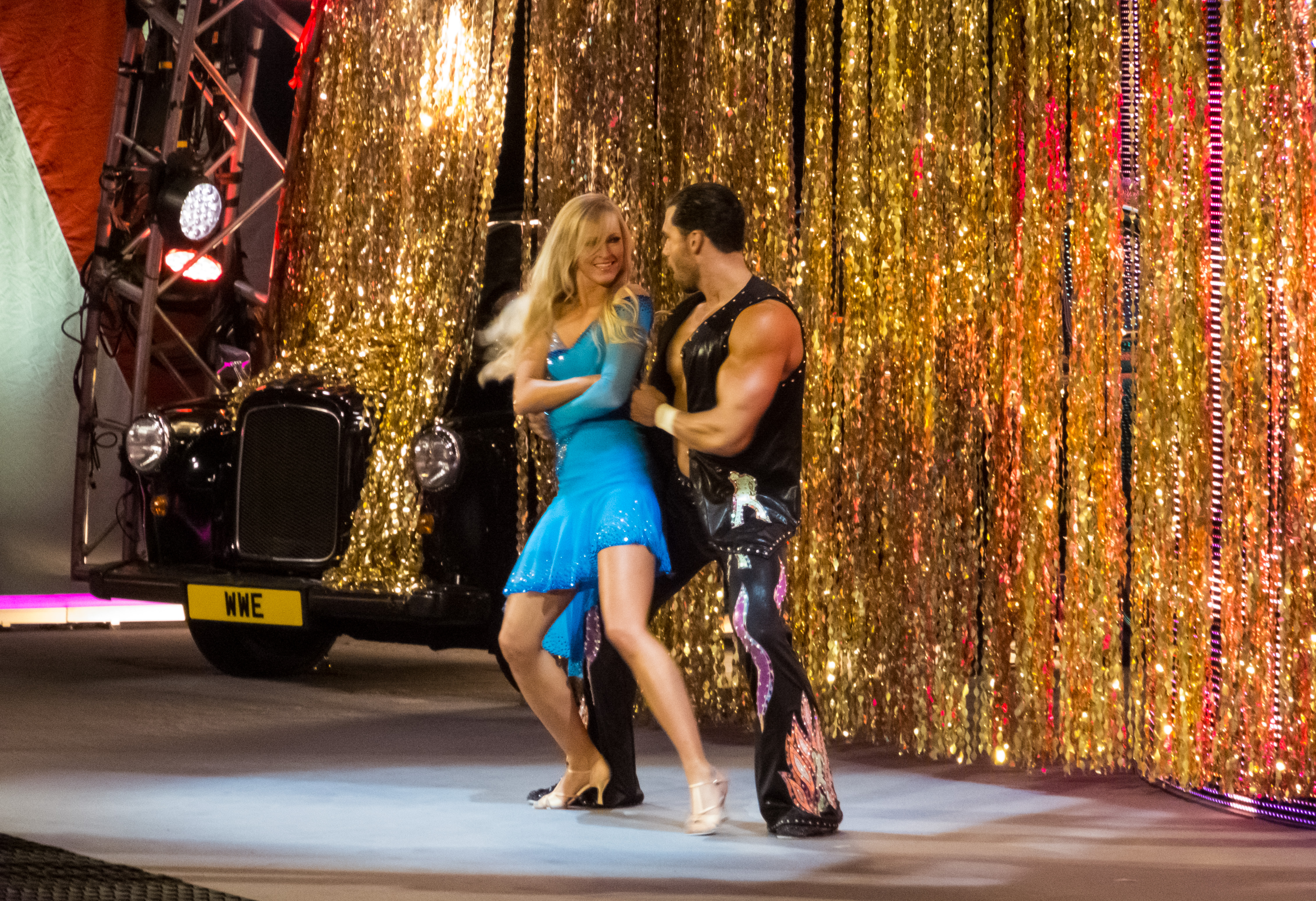 Fandango vs. William Regal